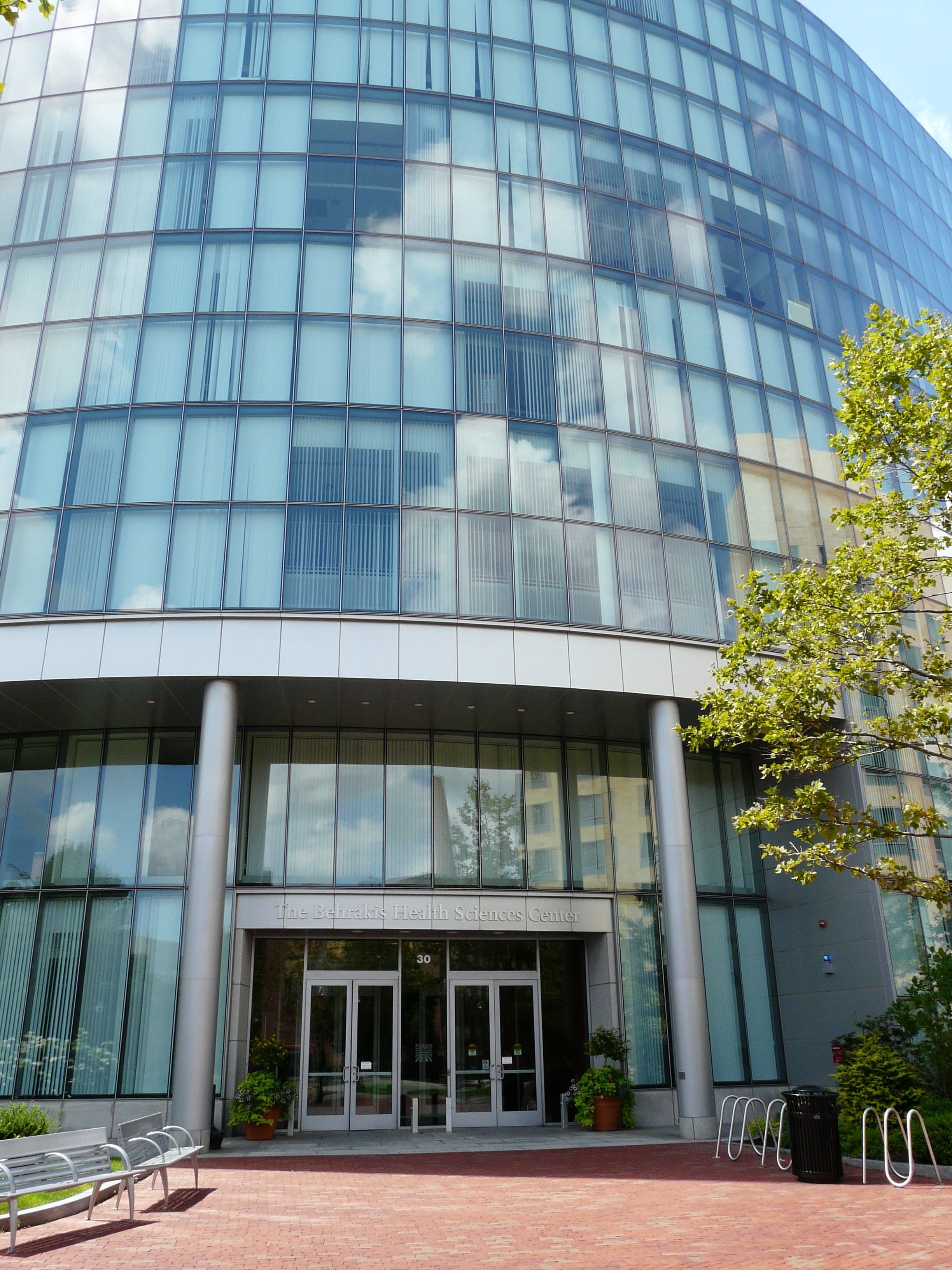 Boston